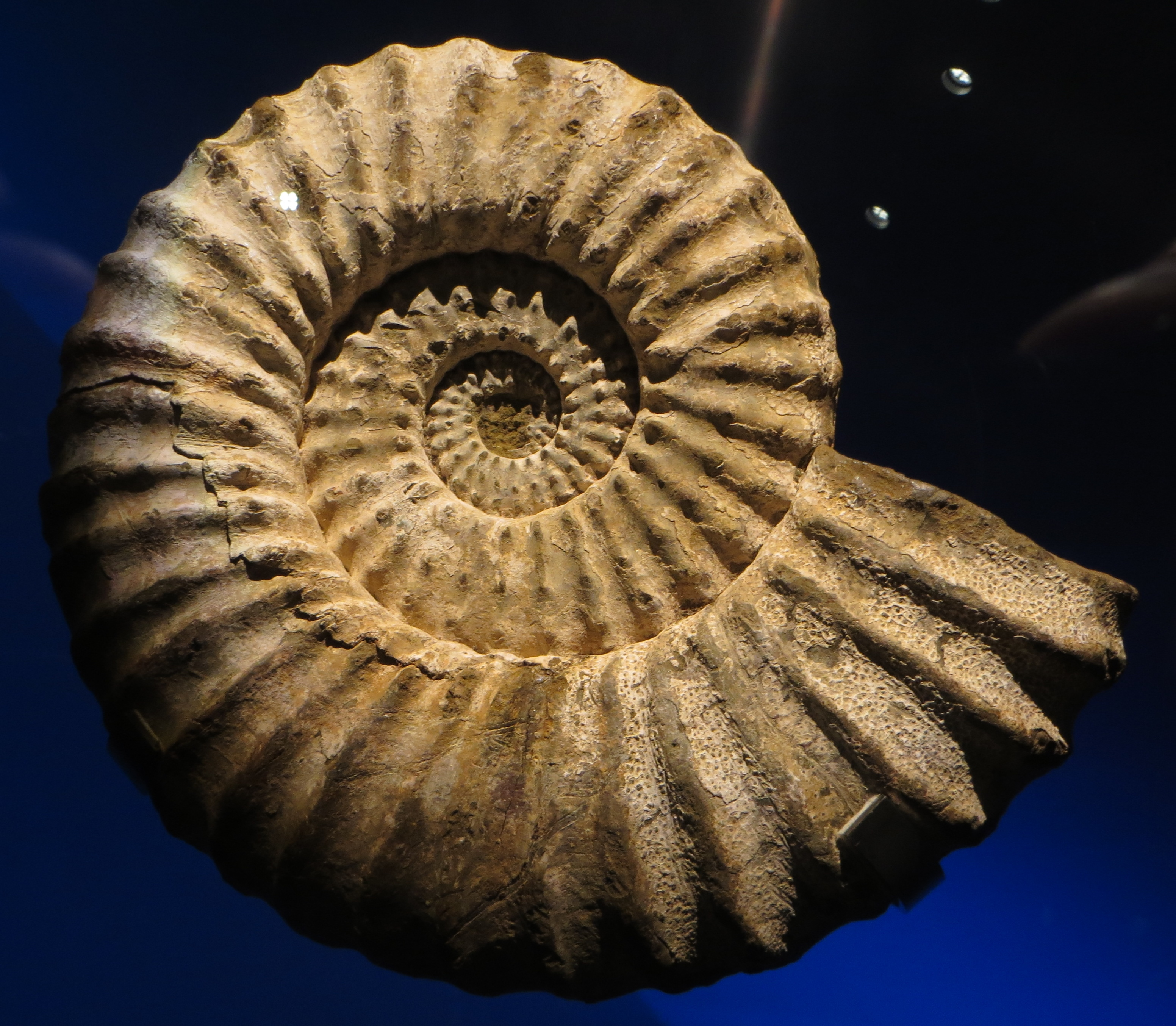 Fossil - Took the picture at Musee des Confluences, Lyon